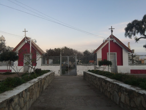 Cementerio Laico de Caldera en 2015.